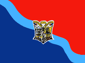 Bandera del municipio José Rafael Revenga, estado Aragua, Venezuela